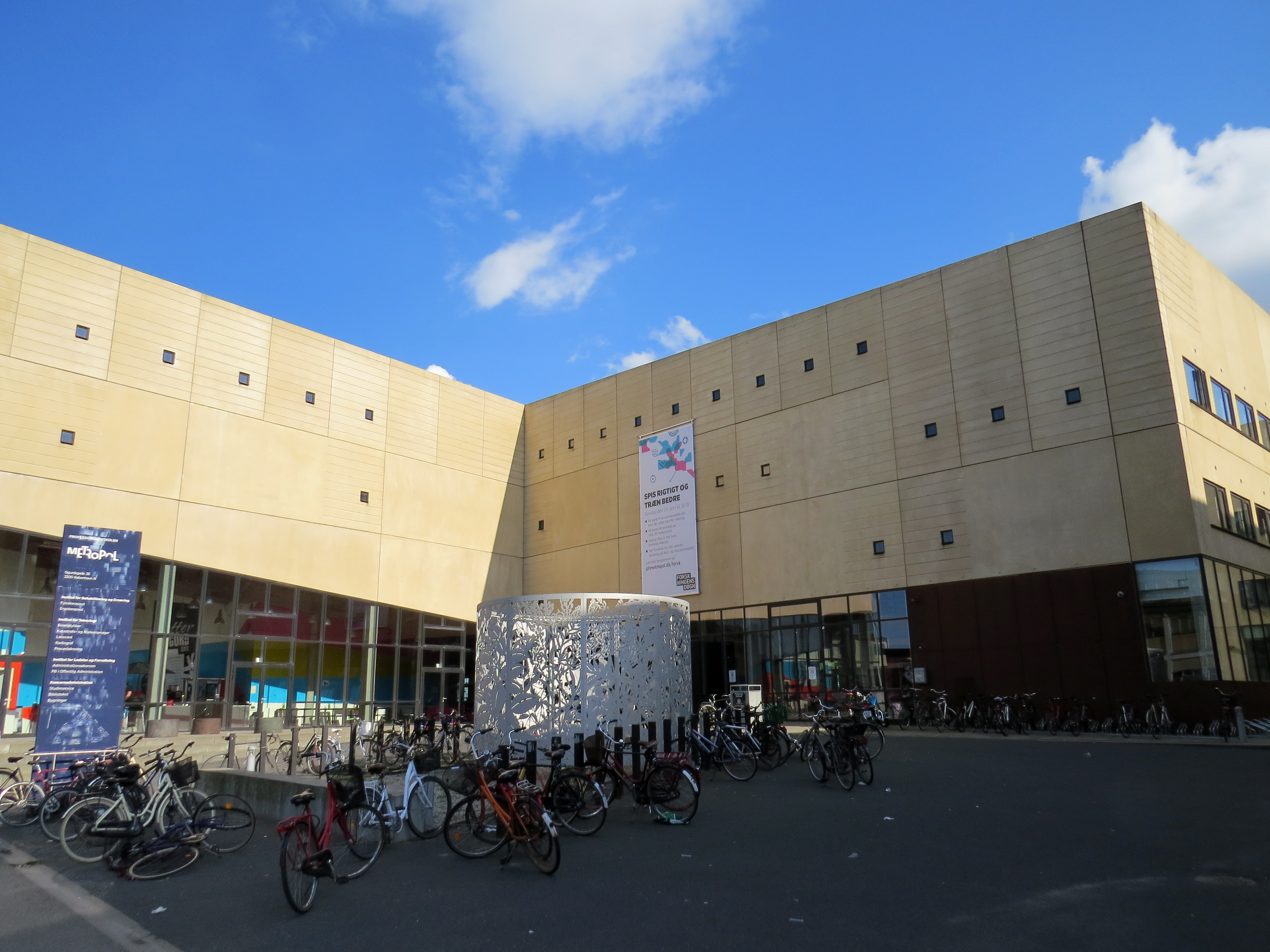 Professionshøjskolen Metropol, Nørrebro, København